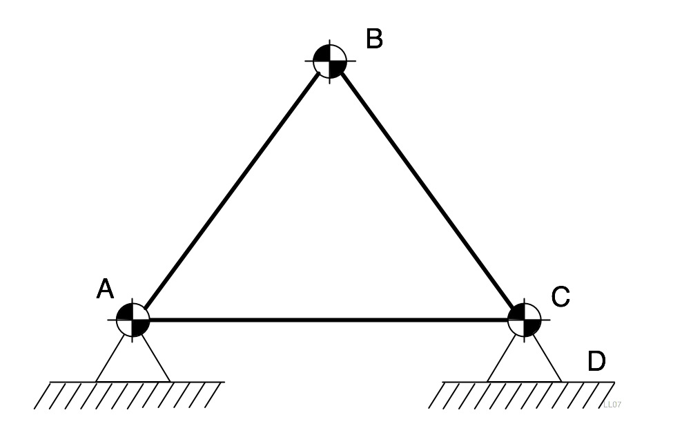 Constructieprincipes. De driehoek, is een voorbeeld, van een constructieprincipe van een vormvaste vakwerk. / Cconstruction principles. Example of a construction principle. The triangle shape is in a truss construction stable.